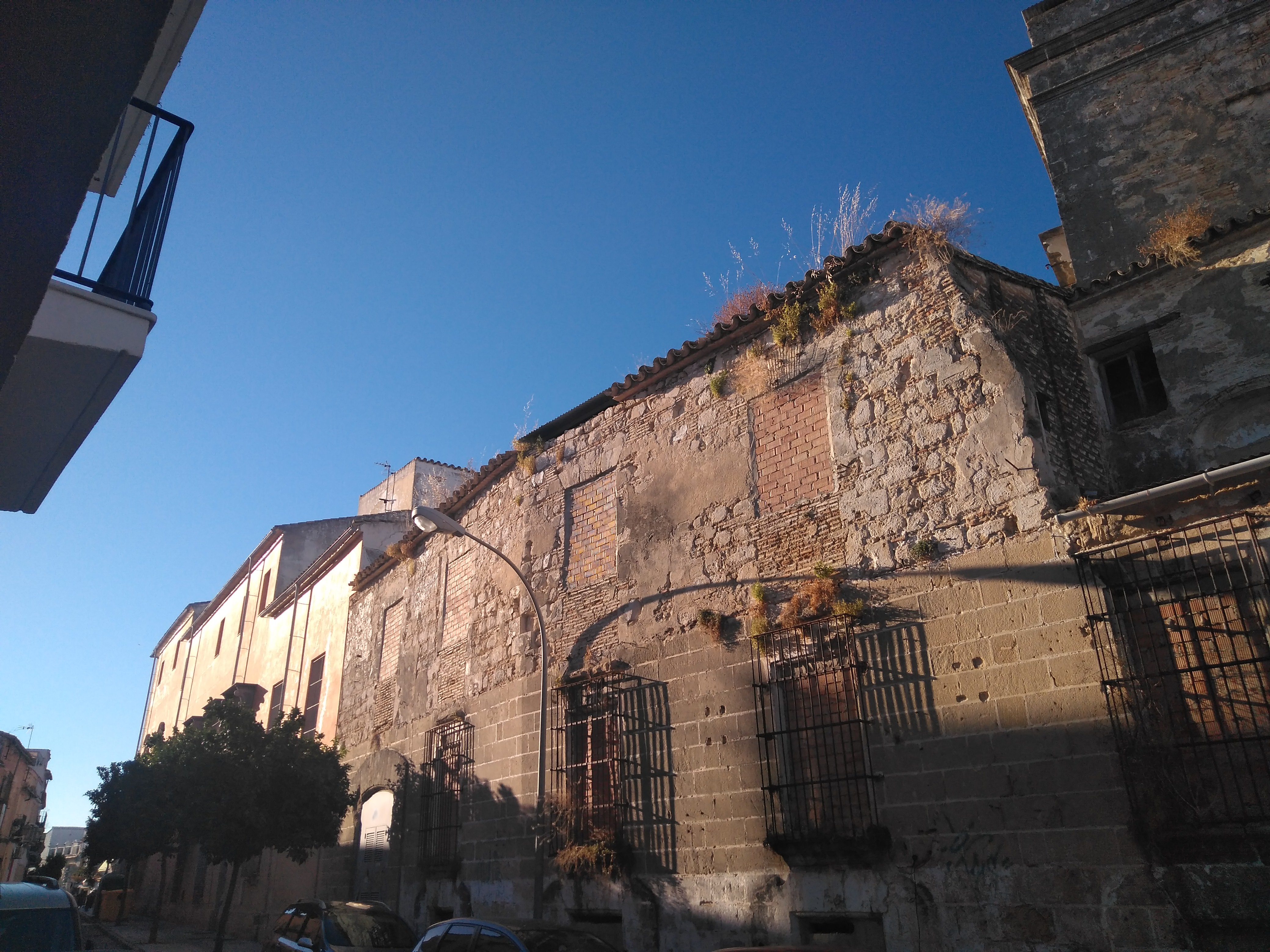 Palacio de Villapanés (Casa grande, abandonada), Jerez de la Frontera (España)